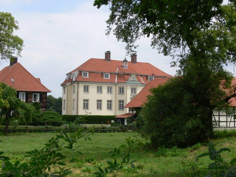 von der Straße